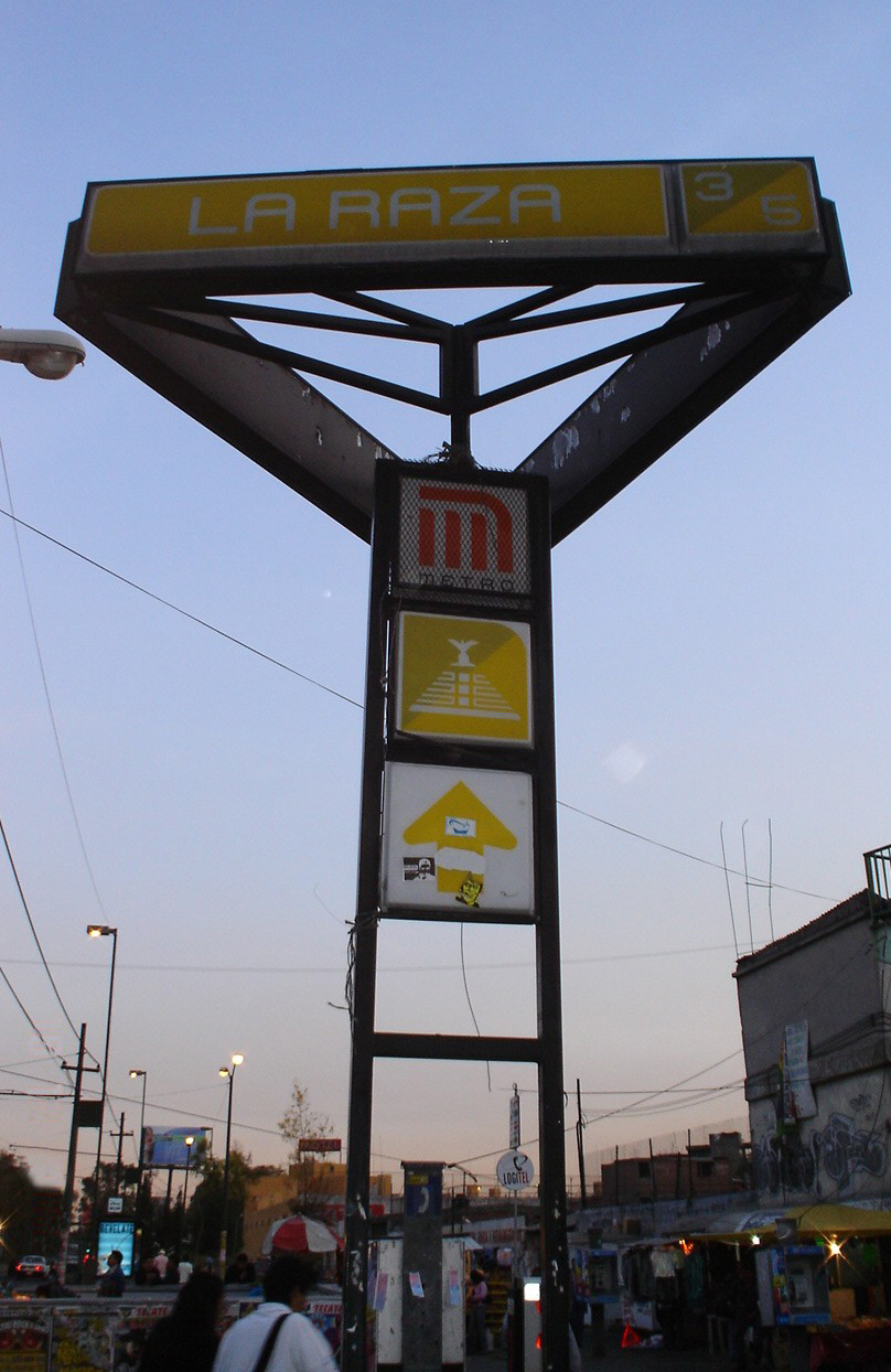 ESTACION LA RAZA